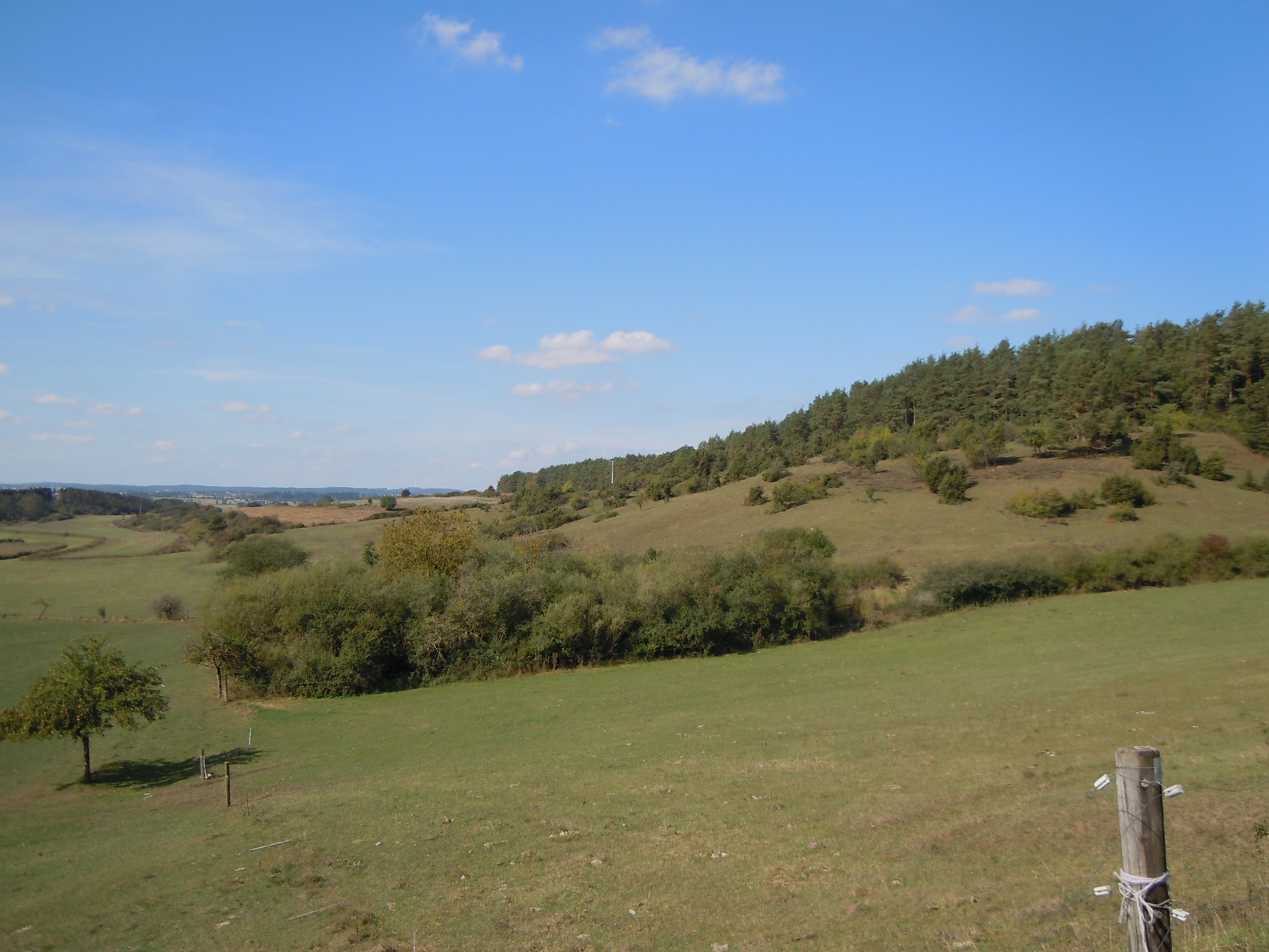 Hungerbühl im Naturschutzgebiet "NSG Hungerbühl-Weiherwiesen" (Schutzgebiets-Nr. 3.215).